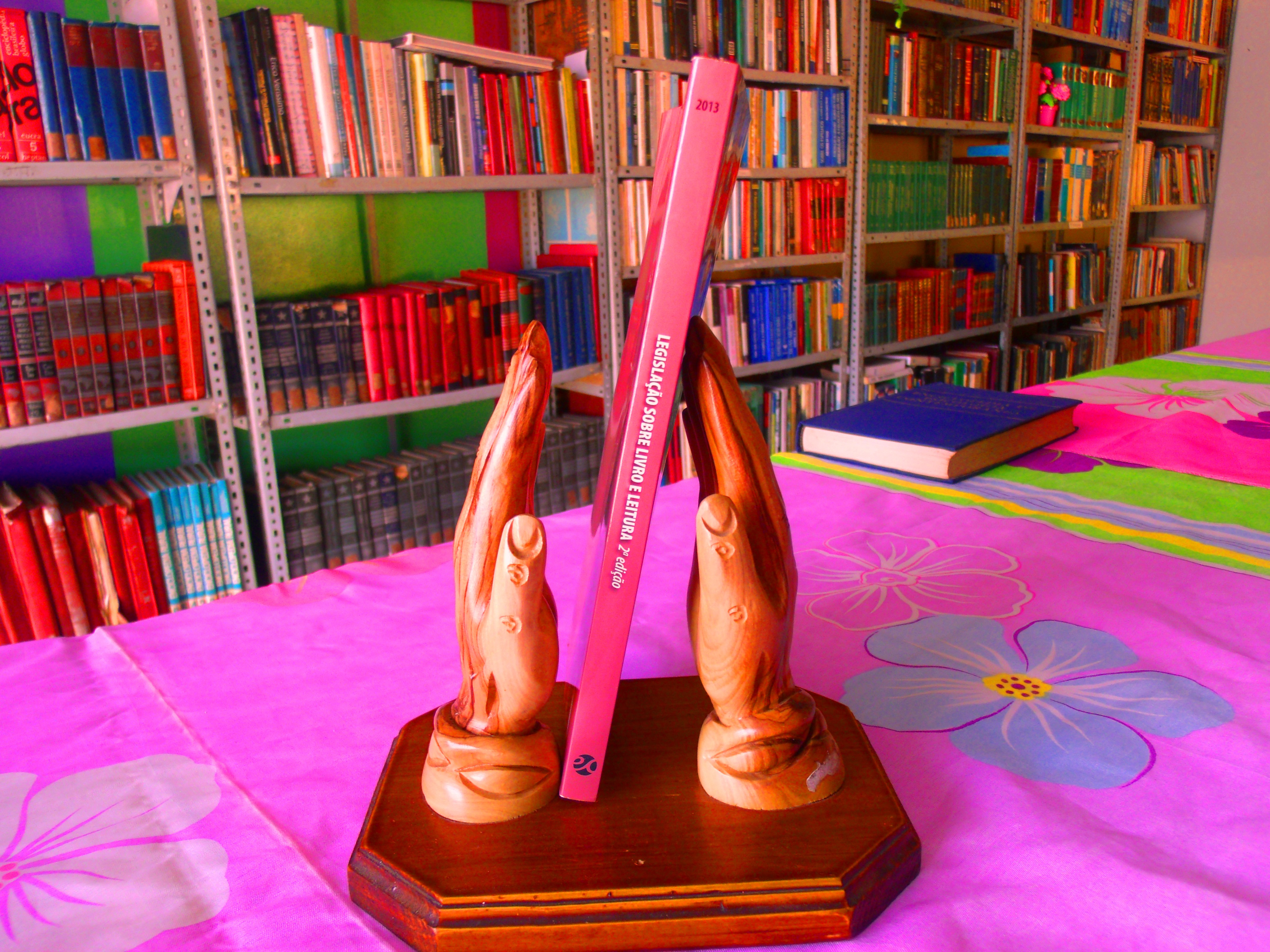 Livro: Legislação sobre Livro e Leitura, publicação da Câmara dos Deputados do Brasil.